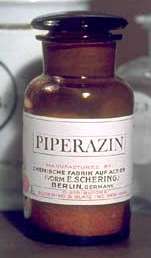 Foto von Piperazin